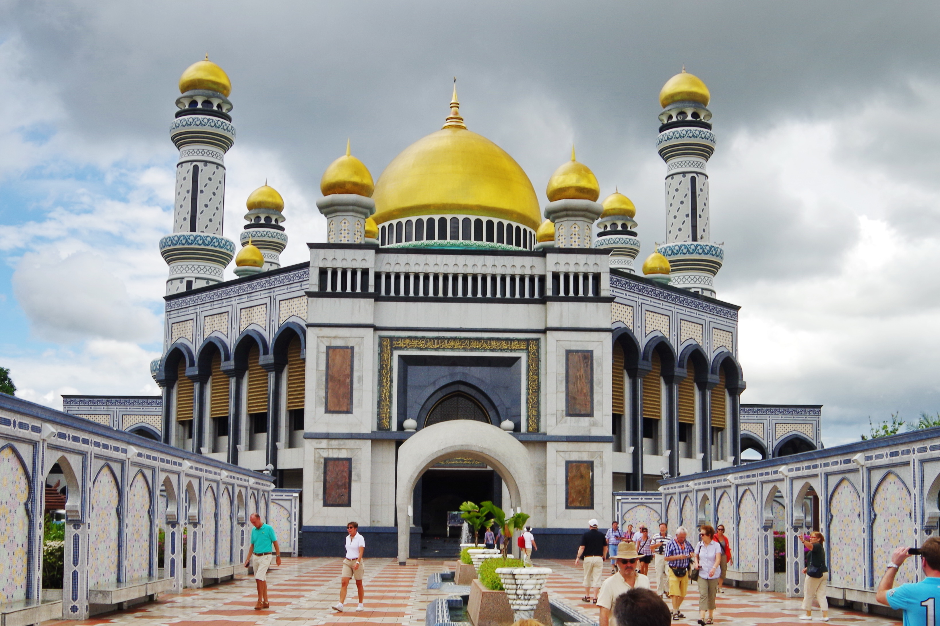 JameAsr Hassanil Bolkiah Mosque